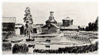 Fliken ur minnet av Sven Axfeldt